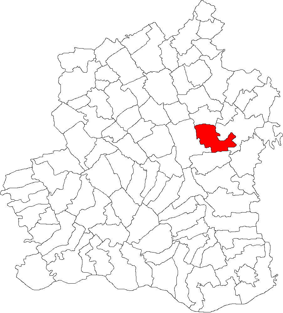 Categorie:Hărţi ale judeţului Teleorman